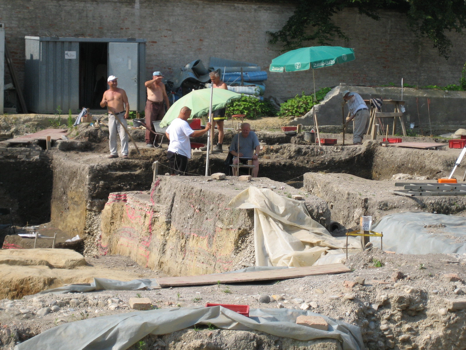 Domviertel in Augsburg, Stadtarchäologen bei Ausgrabungsarbeiten am Inneren Pfaffengäßchen